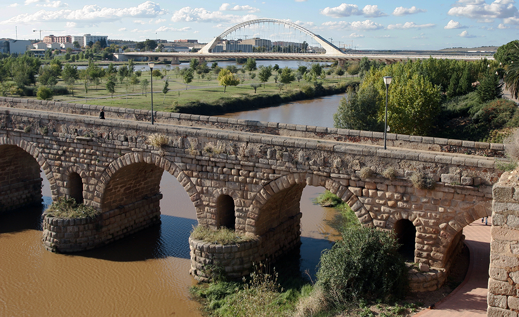 Detalle del puente romano sobre el río Guadiana (Mérida; Badajoz; España). La fecha de construcción de esta obra se sitúa alrededor del año 25 A.C.